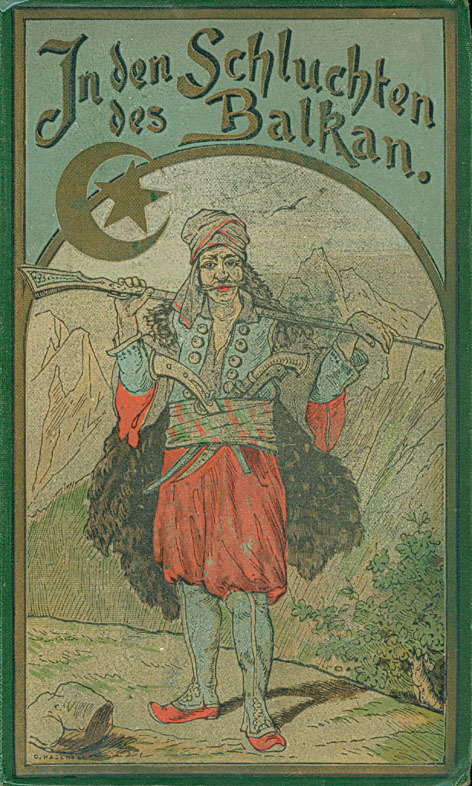 Buchdeckel der klassischen Ausgabe (1892 bis 1898) der Erzählung In den Schluchten des Balkan von Karl May.